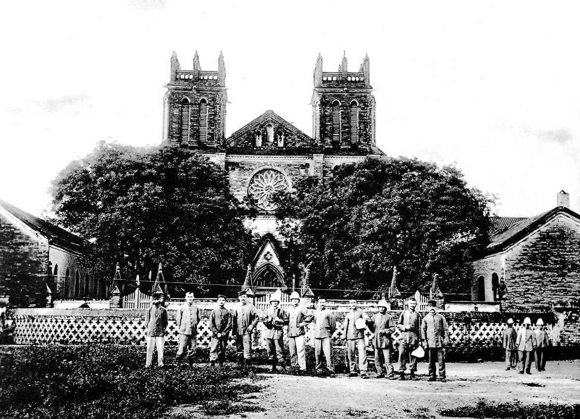 photo from Ein Tagebuch in Bildern